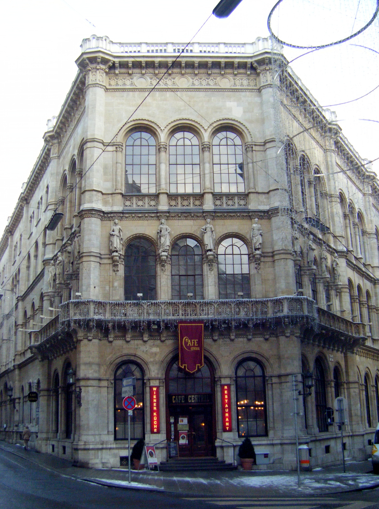 Cafe Central